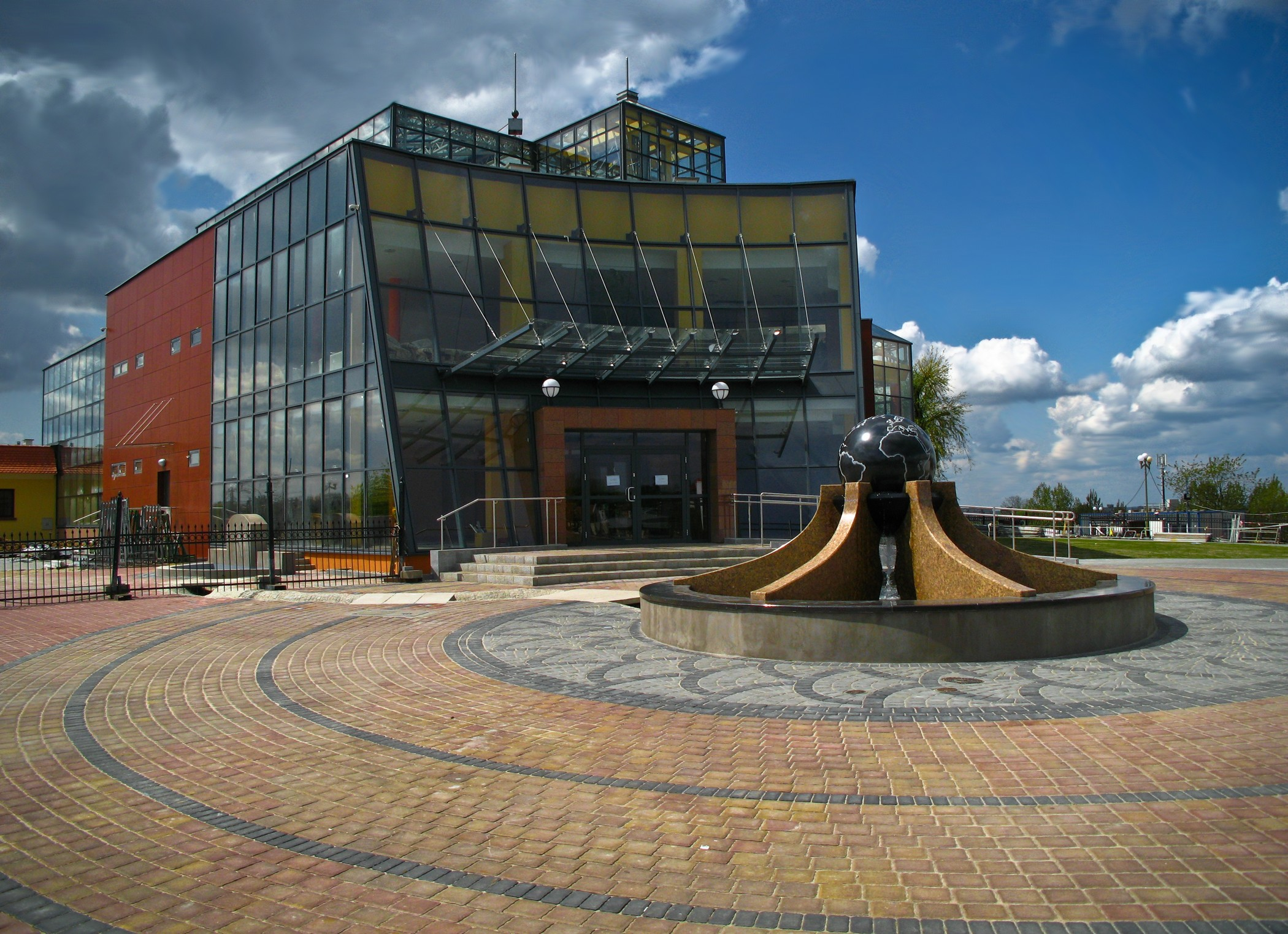 Budynek palmiarni po rozbudowie, stan na 2008.05